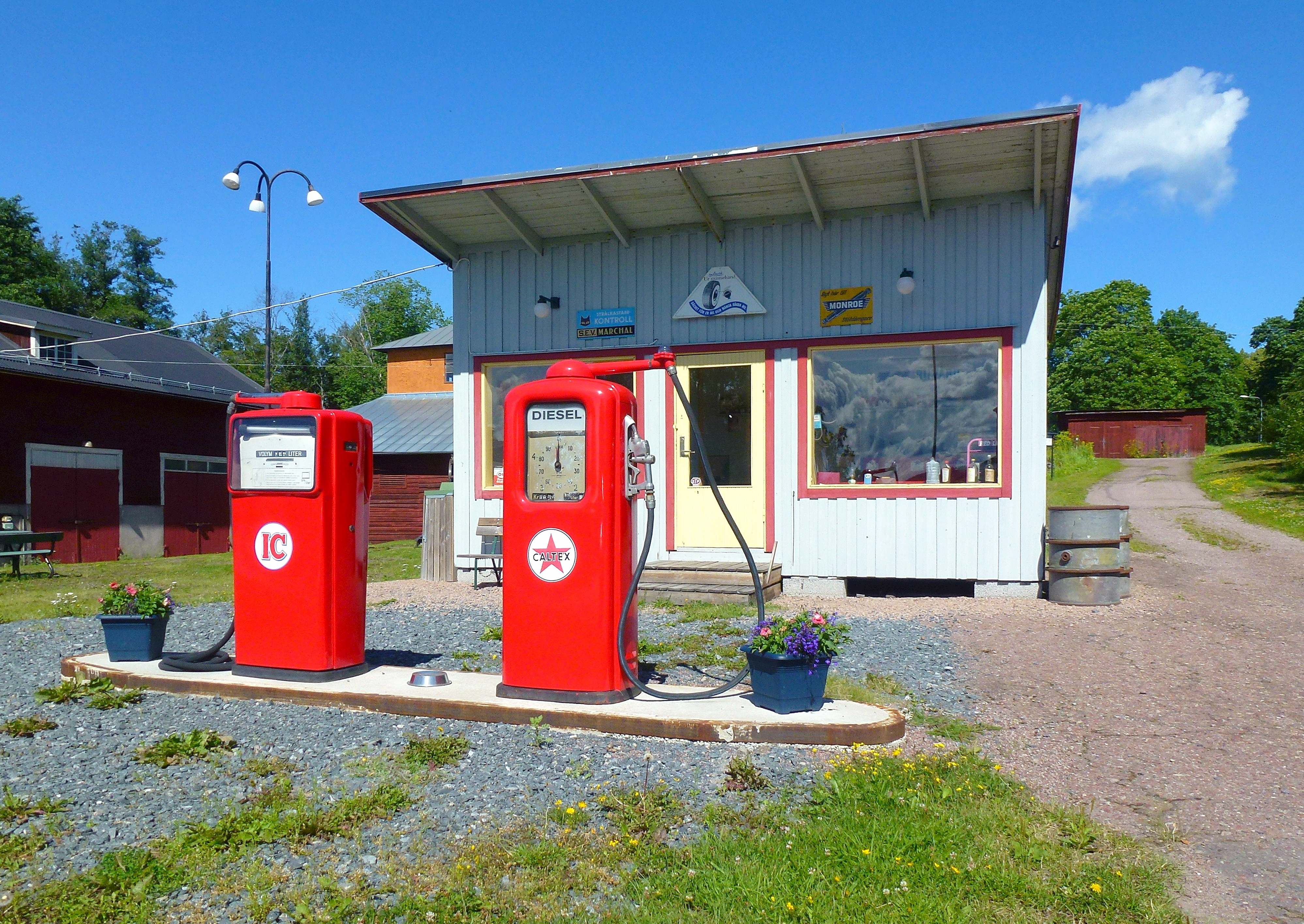 Historisk bensinmack IC och Caltex i Långshyttan